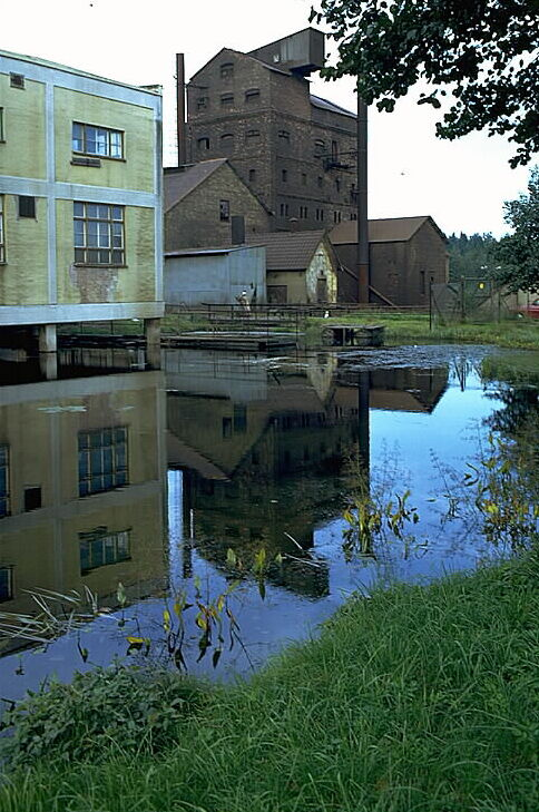 Tillhör Laxå bruk. Bilden troligen från mitten av 1970-talet. Motiv: Röfors hytta Kategori: BruksmiljöTillhör Laxå bruk. Bilden troligen från mitten av 1970-talet.